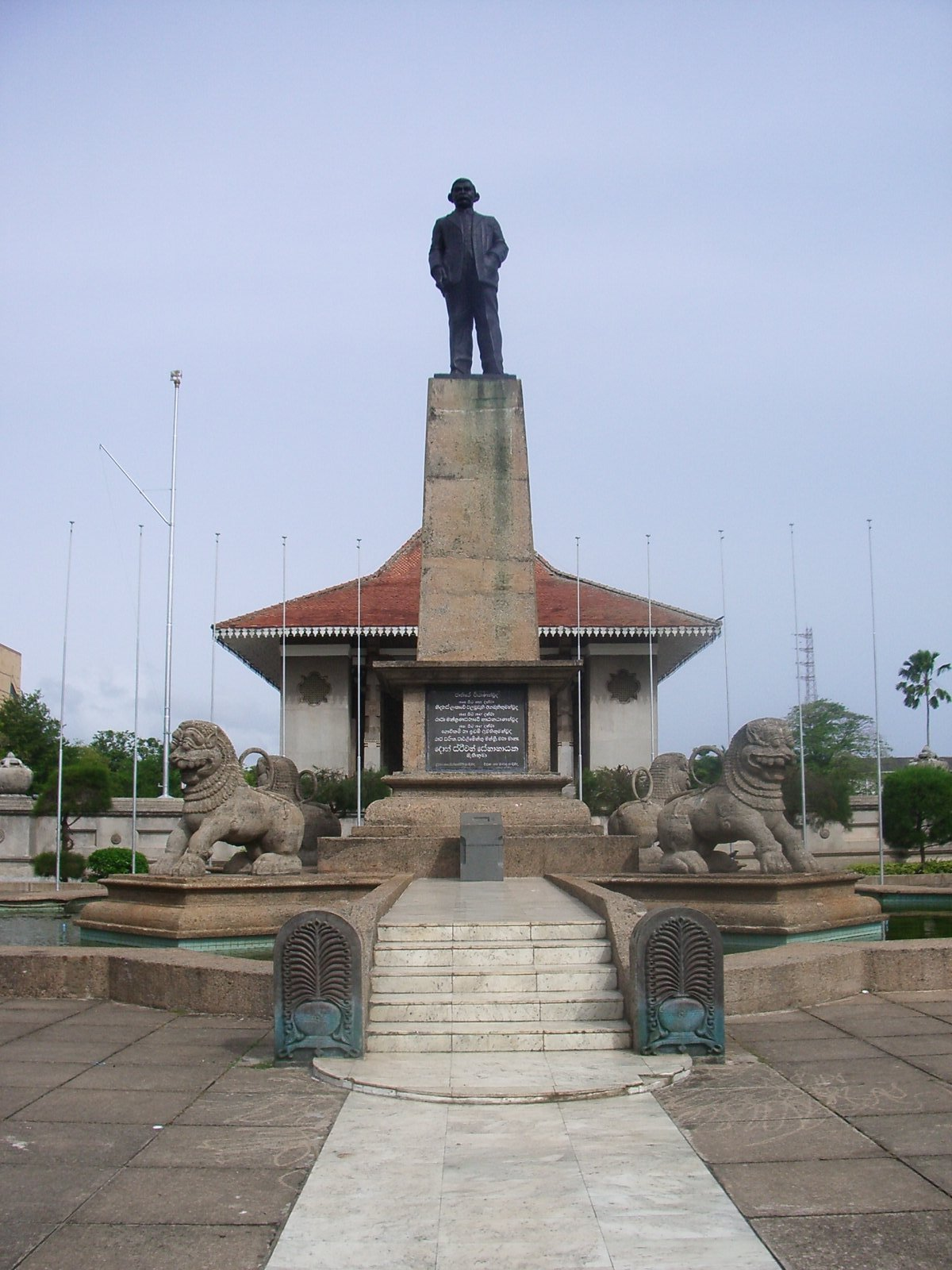 Independence Memory hall a Colombo, foto feta per J. Ollé el juliol del 2006